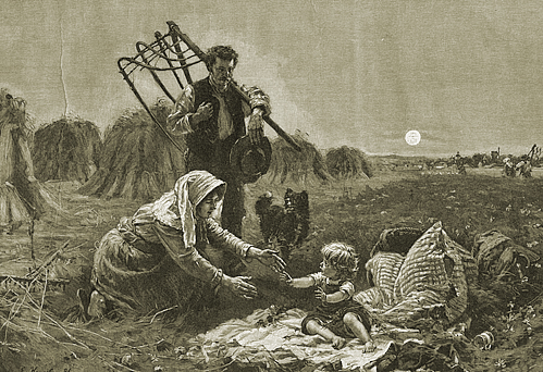 „Ernteabend“, Holzschnitt nach einem Gemälde von Ernst Henseler, 28 x 19 cm, Verlag von Franz Hanfstängl, München. – Abgebildet ist u.a. ein Schnitter mit Reff-Sense.